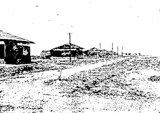 中文（台灣）: 榮村為台南州莿桐庄和虎尾街的日本移民村